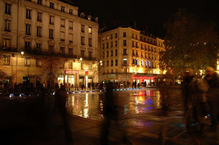 Photographer : Jean-Romain PAC Description : Place de la République during the "Fete des Lumières" event Location : Lyon, FRANCE Year : 2005